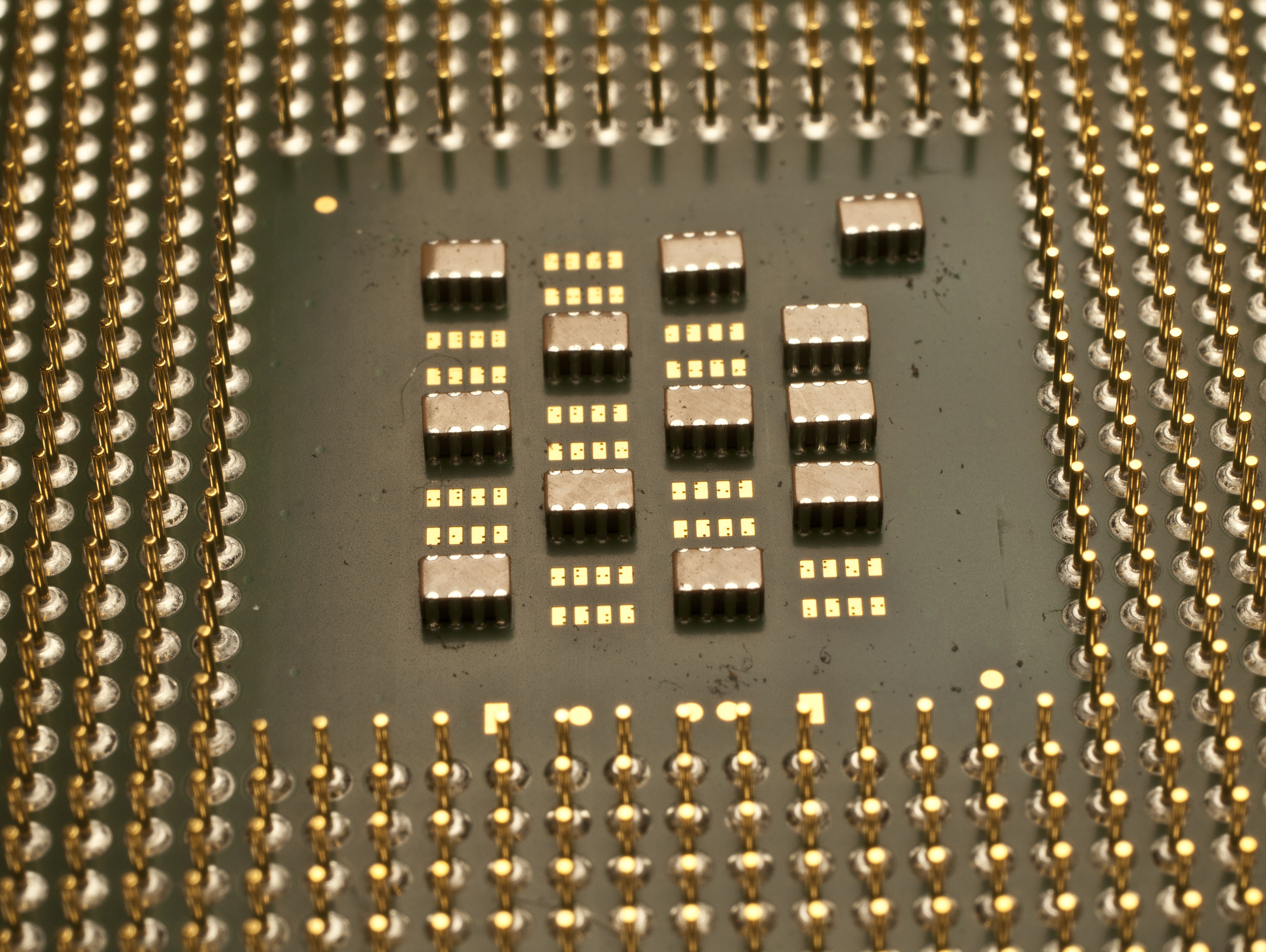 Intel Pentium 4